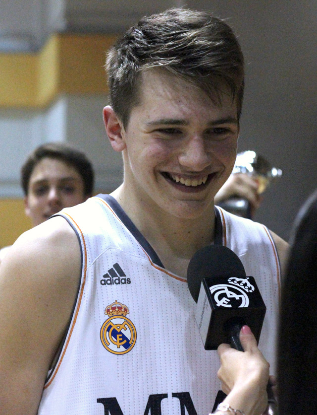 Luka Doncic, Jorge Parra, Domagoj Proleta y Pablo Poyatos